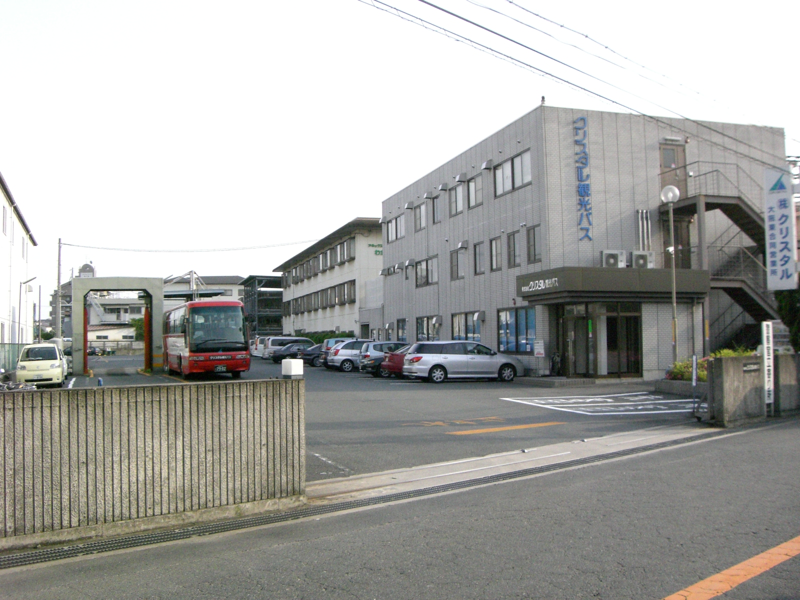 Crystal-Bus at Higashi-Osaka